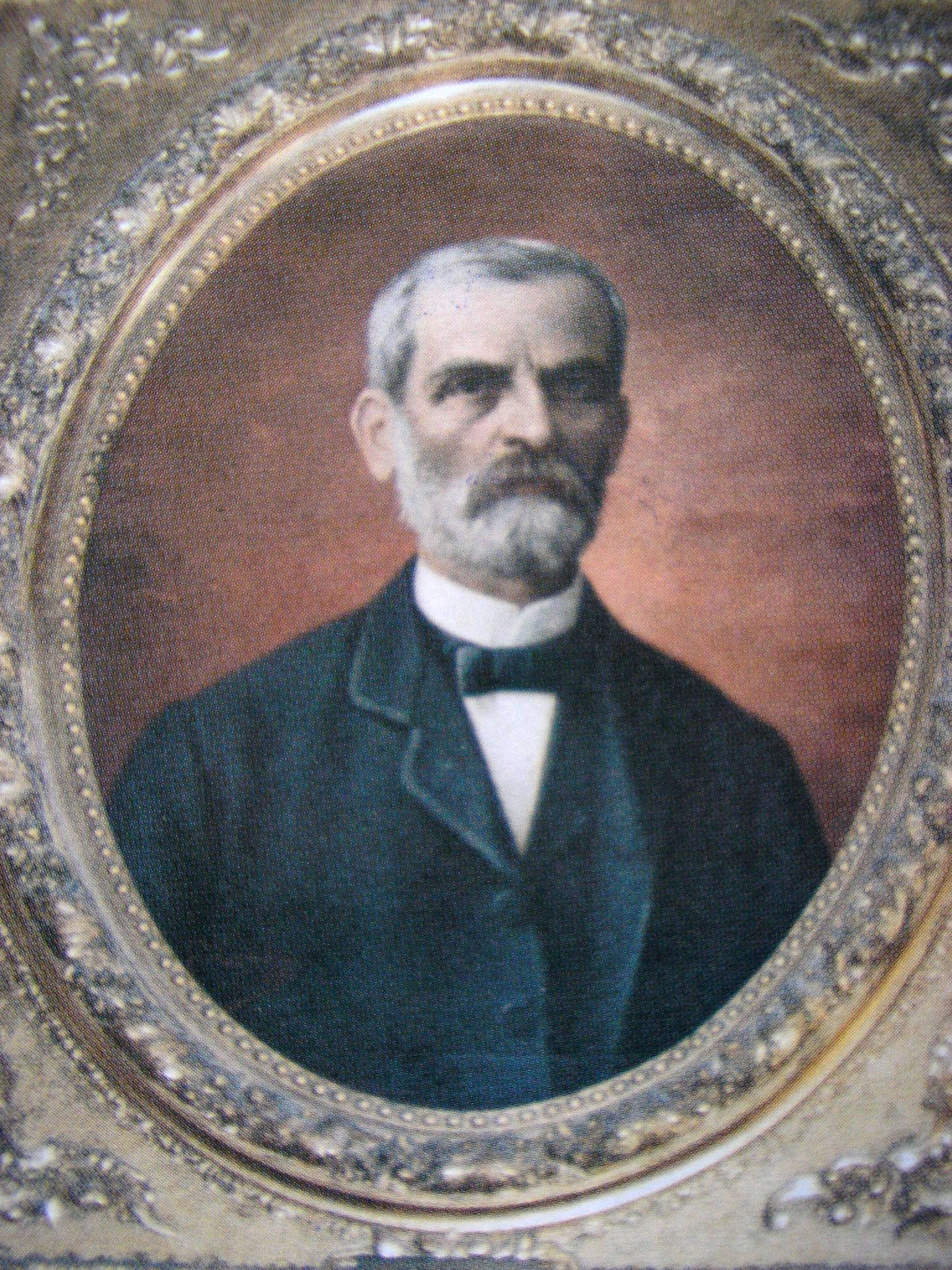 Προσωπογραφία Ιάκωβου Πολυλά